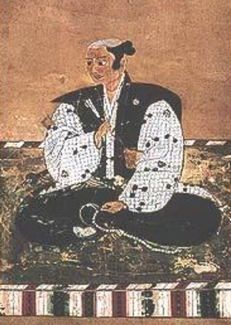 松平定吉の肖像。